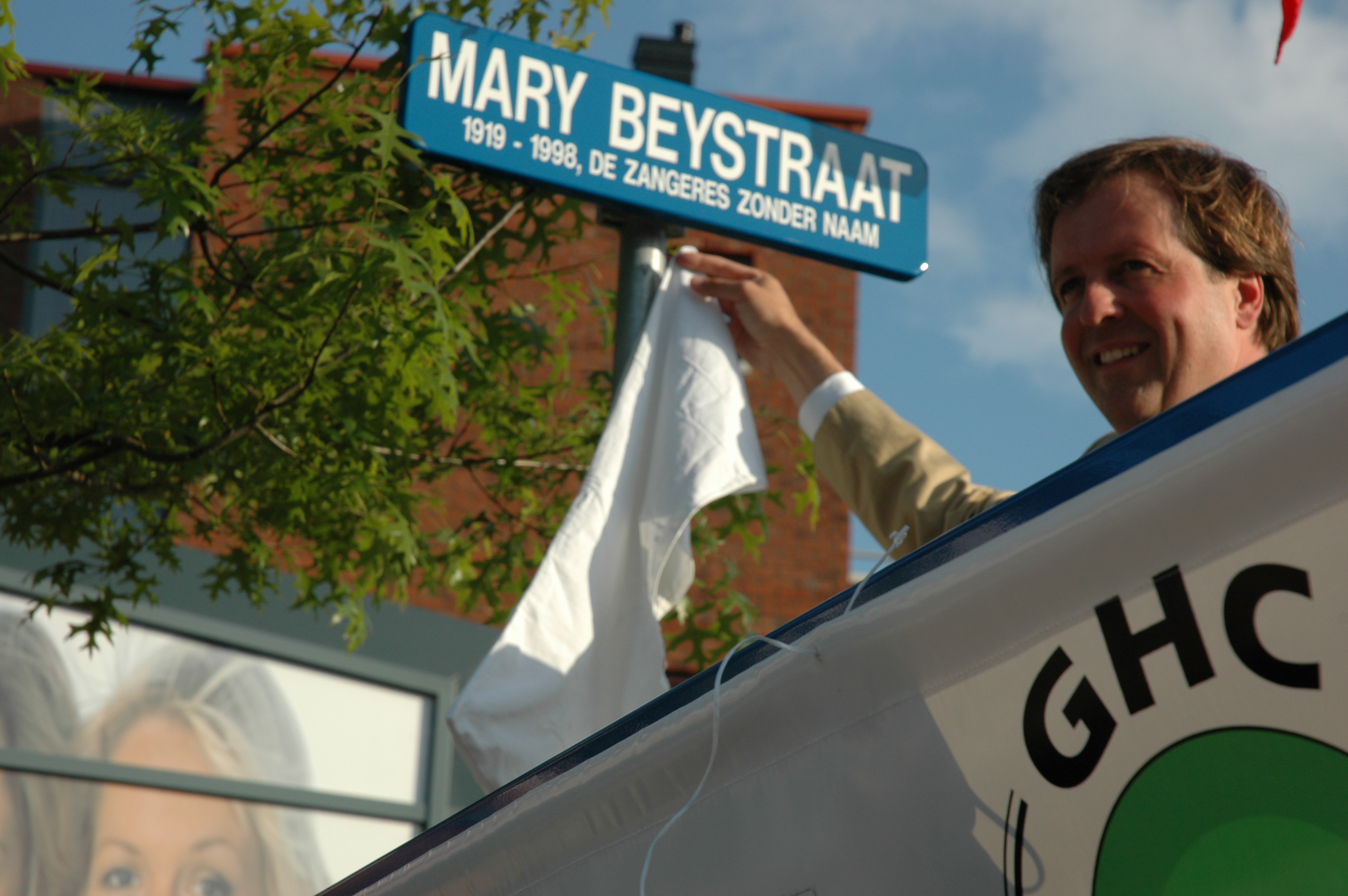 Alexander Pechtold opent Mary Beystraat in Leiden